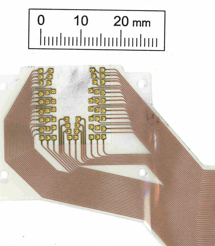 Flexible Leiterplatte mit Goldkontakten zum beweglichen Anschluss des Druckkopfes in einem Tintenstrahldrucker